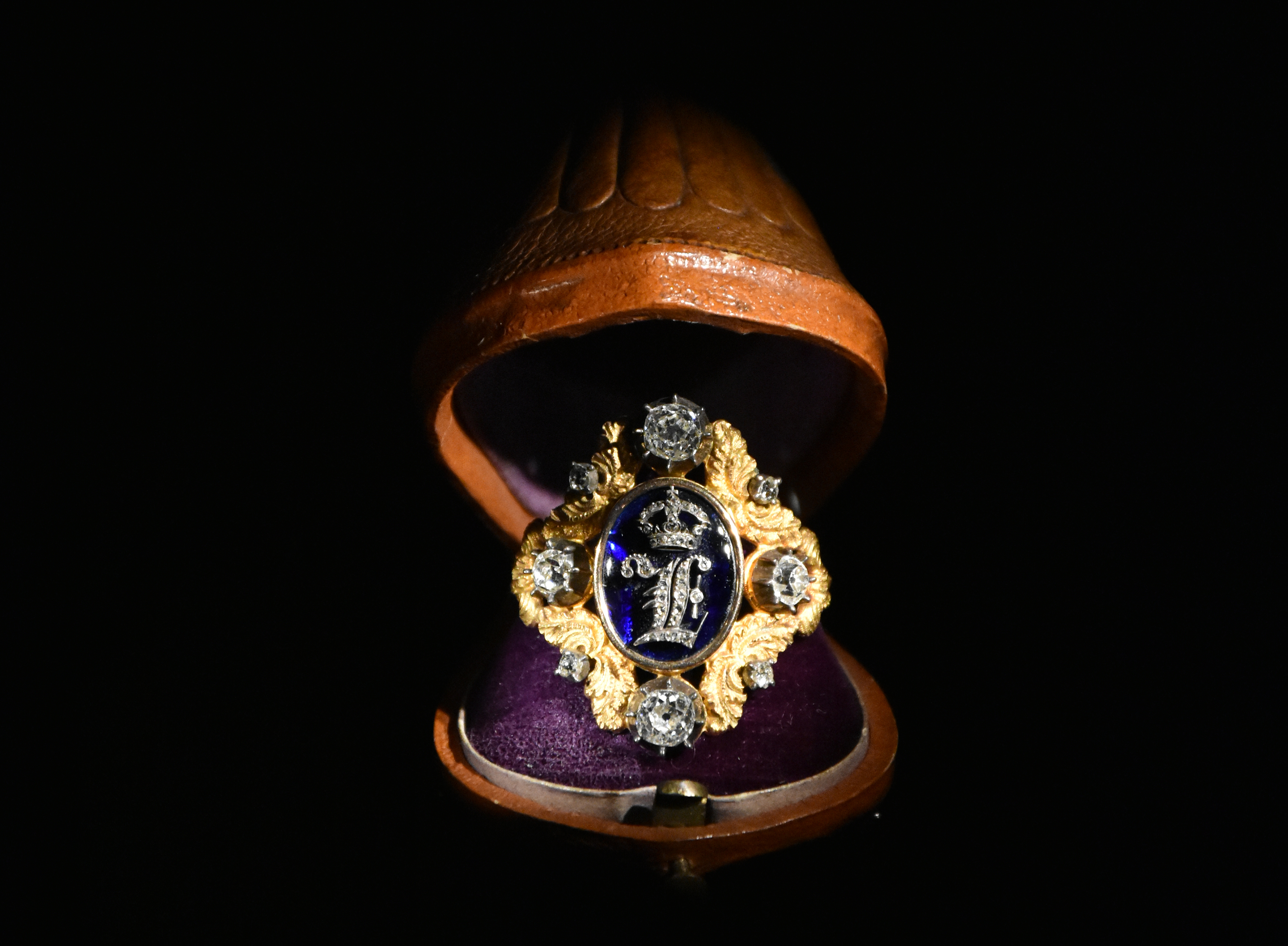 Ring met monogram van Leopold I DIVA Antwerpen 27-12-2018